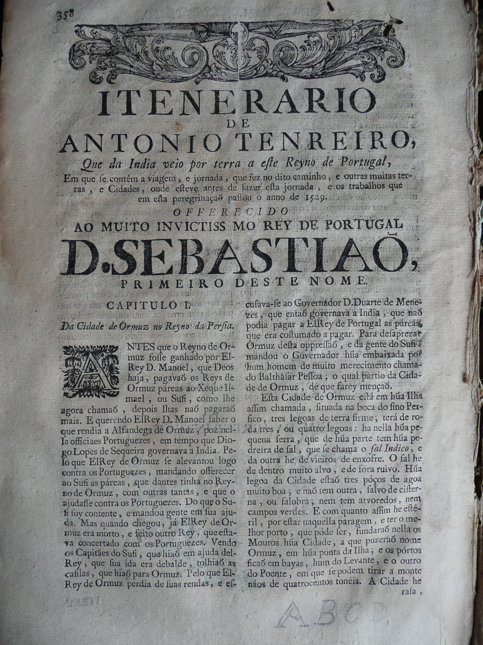 Itinéraire de António Tenreiro qui de l'Inde vint par voie de terre à ce royaume (Portugal), en 1529